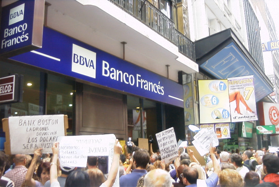 Manifestación de ahorristas argentinos contra el Corralito financiero frente a la una sucursal del BBVA Banco Francés ubicada en calle Florida, Buenos Aires, Argentina.